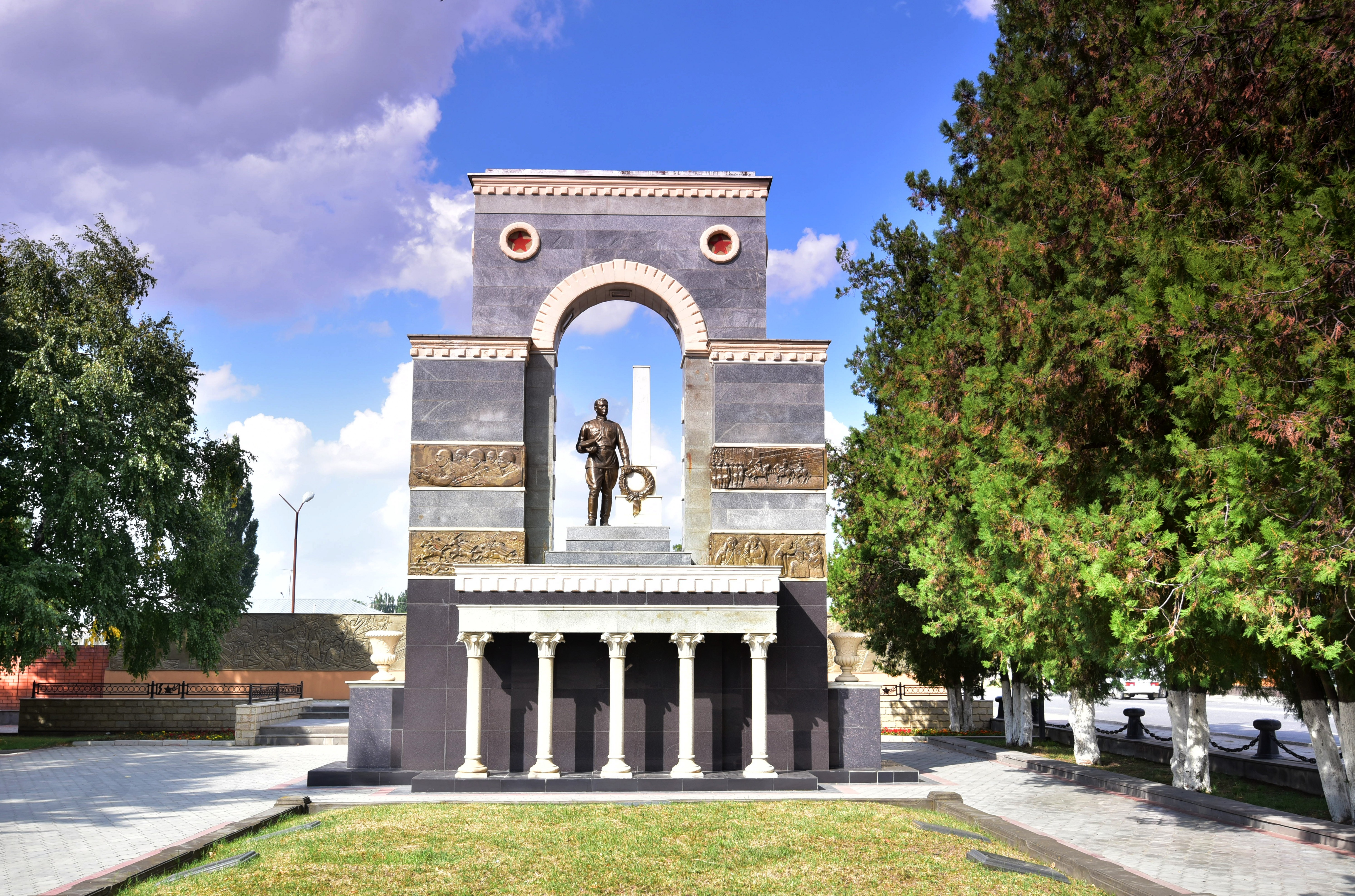 Памятник советским воинам, погибшим в годы Великой Отечественной войны 1941-1945 гг.: площадь Кирова, сквер, Черкесск, Карачаево-Черкесия